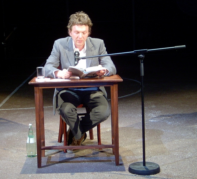 Der Schriftsteller Alexander Osang während einer Buchlesung im Deutschen Theater, Berlin-Mitte